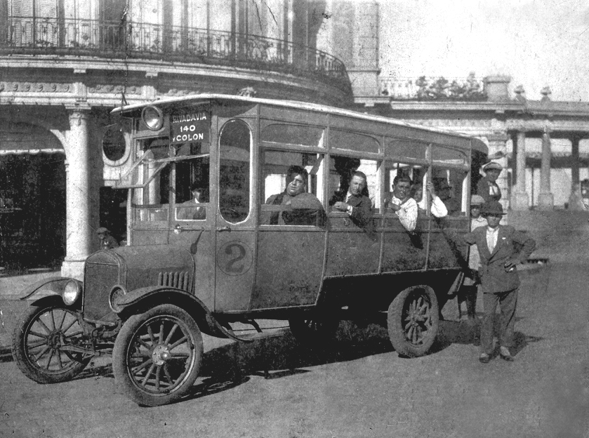 “En esta foto se ve a mi tío Fermín Angelucci junto a sus amigos en uno de los primeros colectivos que circularon por Mar del Plata. La fecha de la foto data del año 1929”. María Angélica Angelucci.